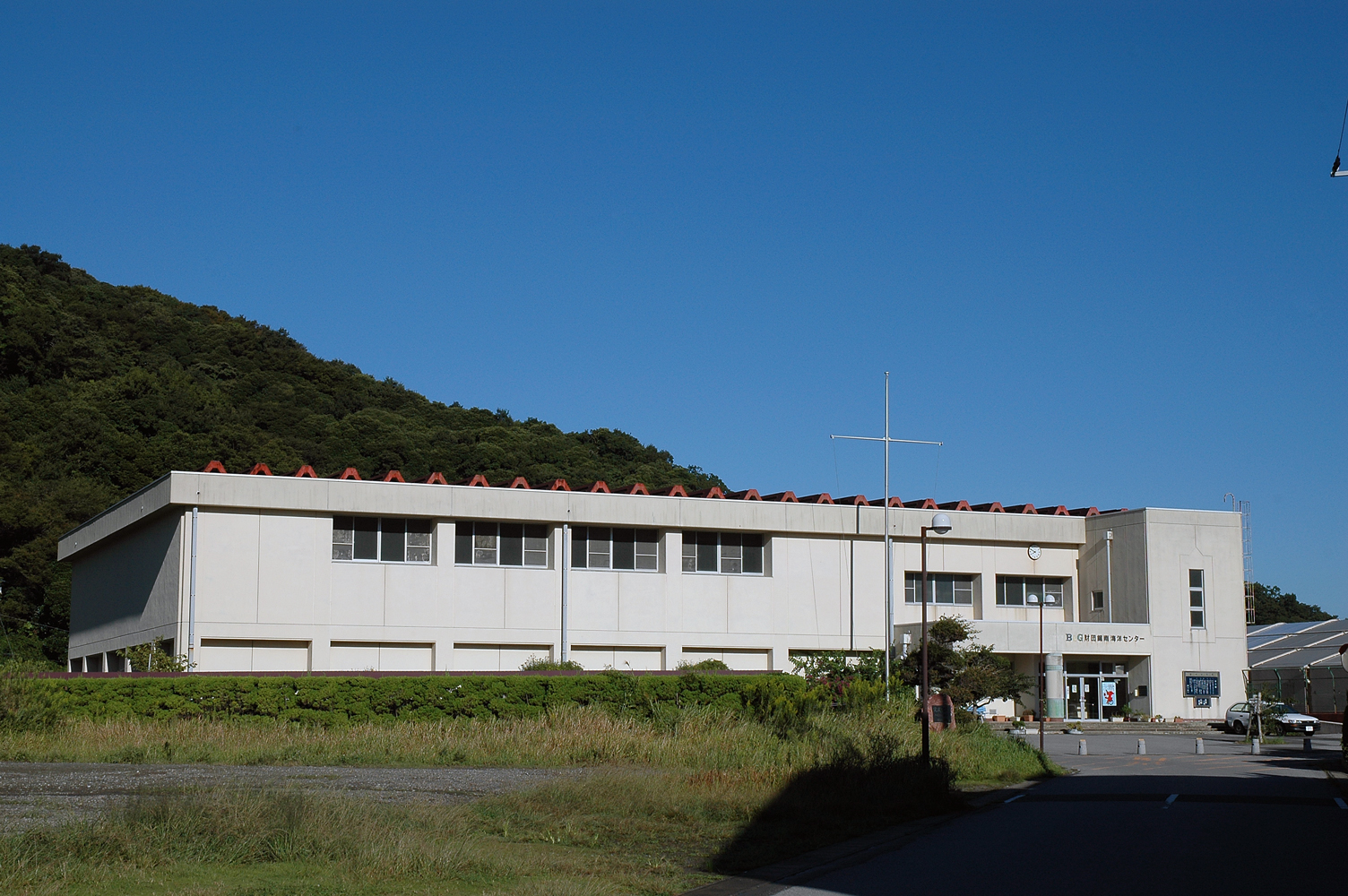 鋸南町B＆G海洋センター